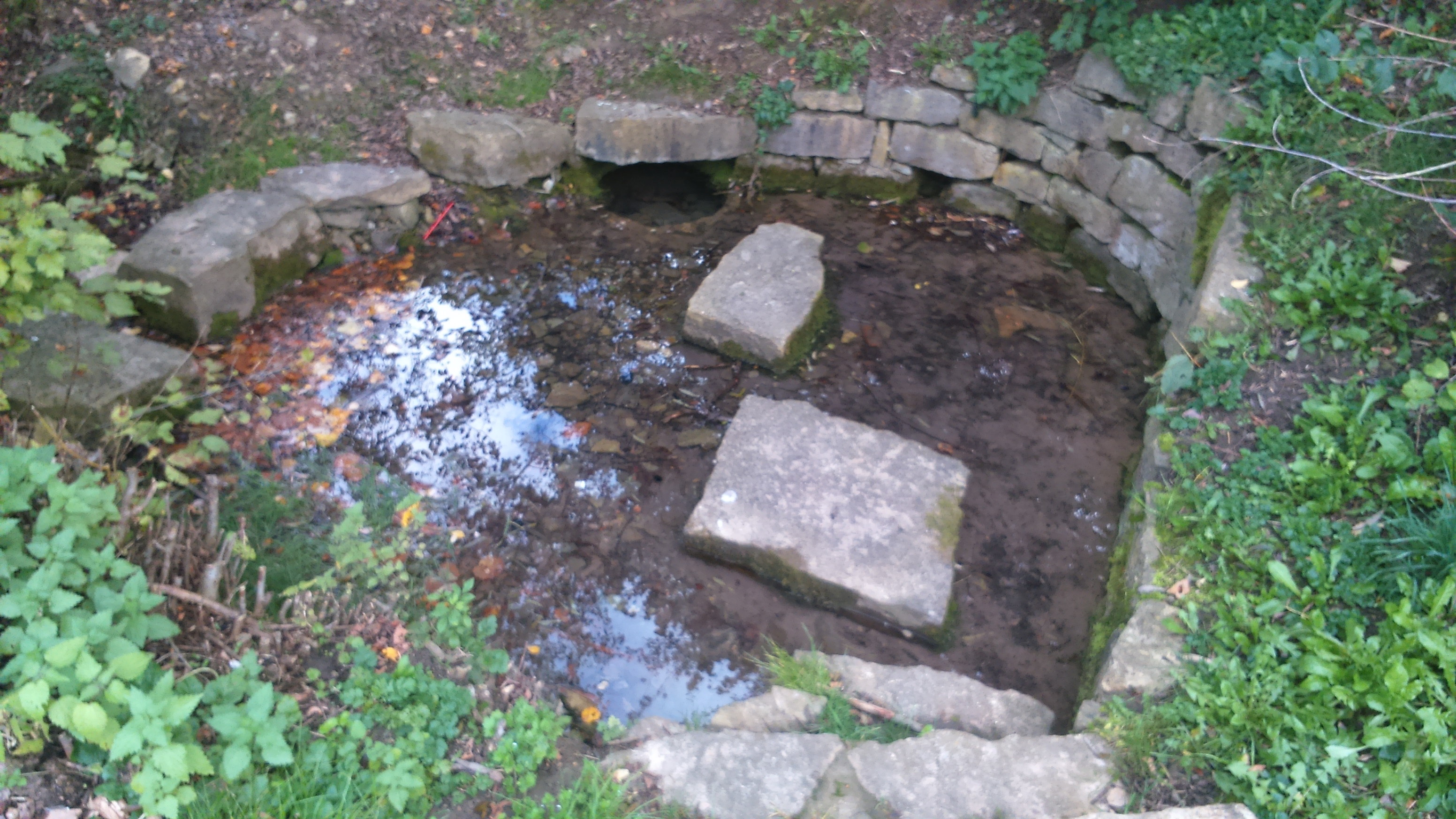 Die Quelle des Aalbaches westlich von Waldbrunn